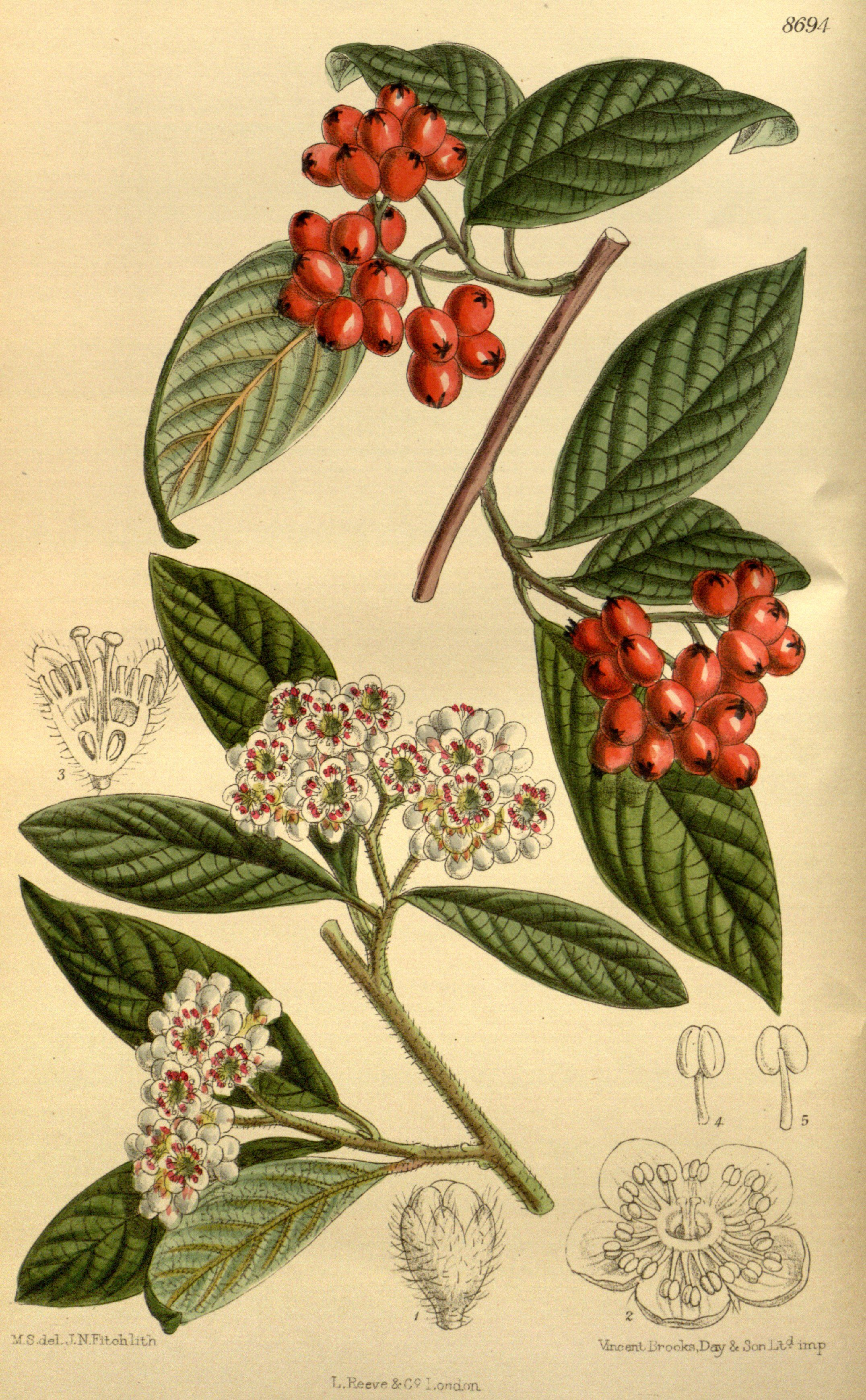 Cotoneaster salicifolius var. rugosus, Rosaceae